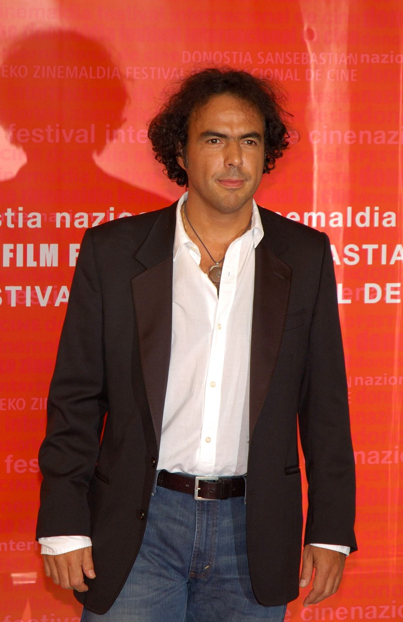 El director de cine mexicano Alejandro González Iñárritu en el Festival Internacional de Cine de San Sebastián 2006